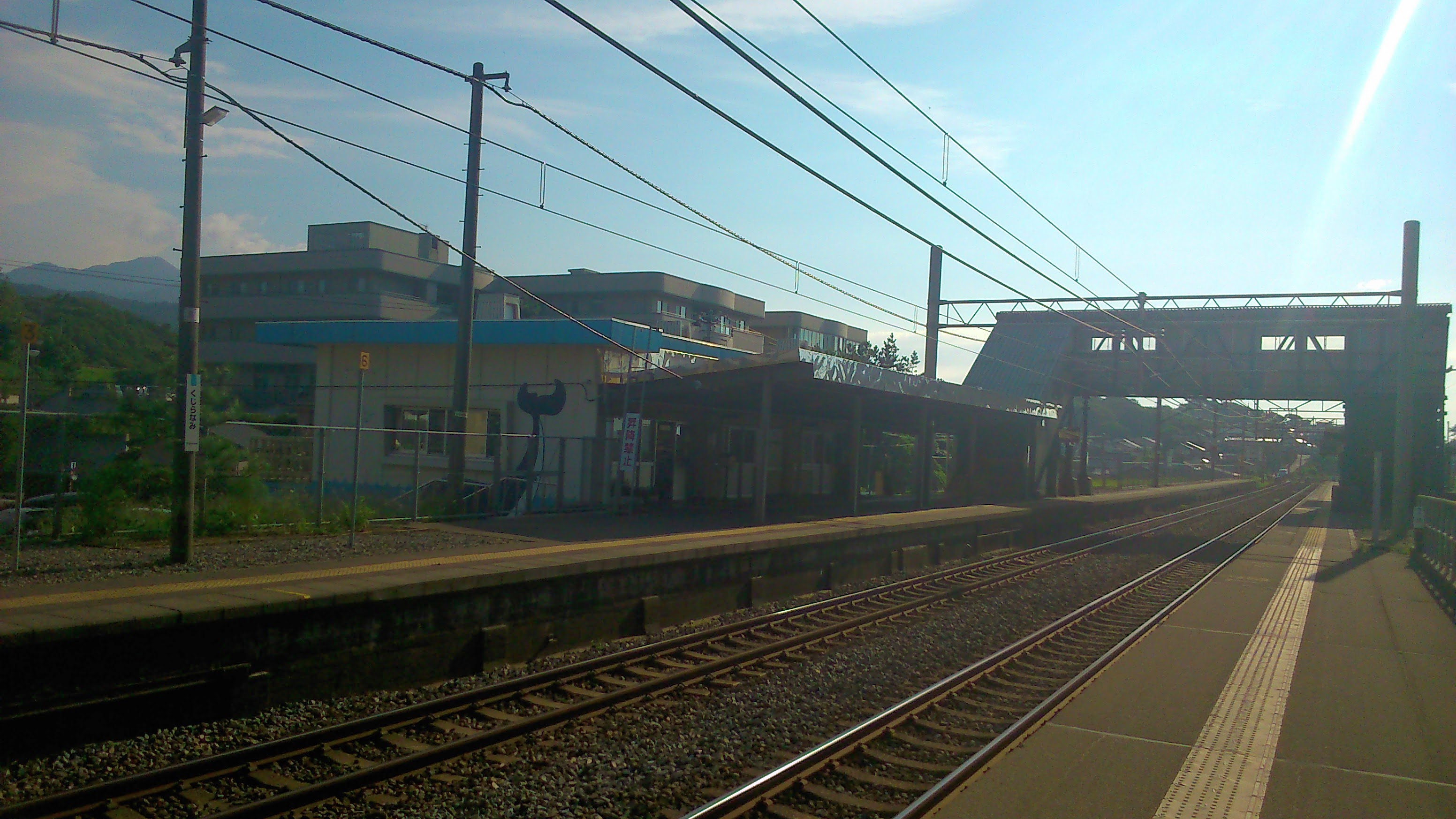 鯨波駅のホーム上から見た駅舎